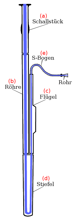 Querschnittsgraphik eines Fagotts mit Beschriftung der Einzelteile und der Luftsäule in blau